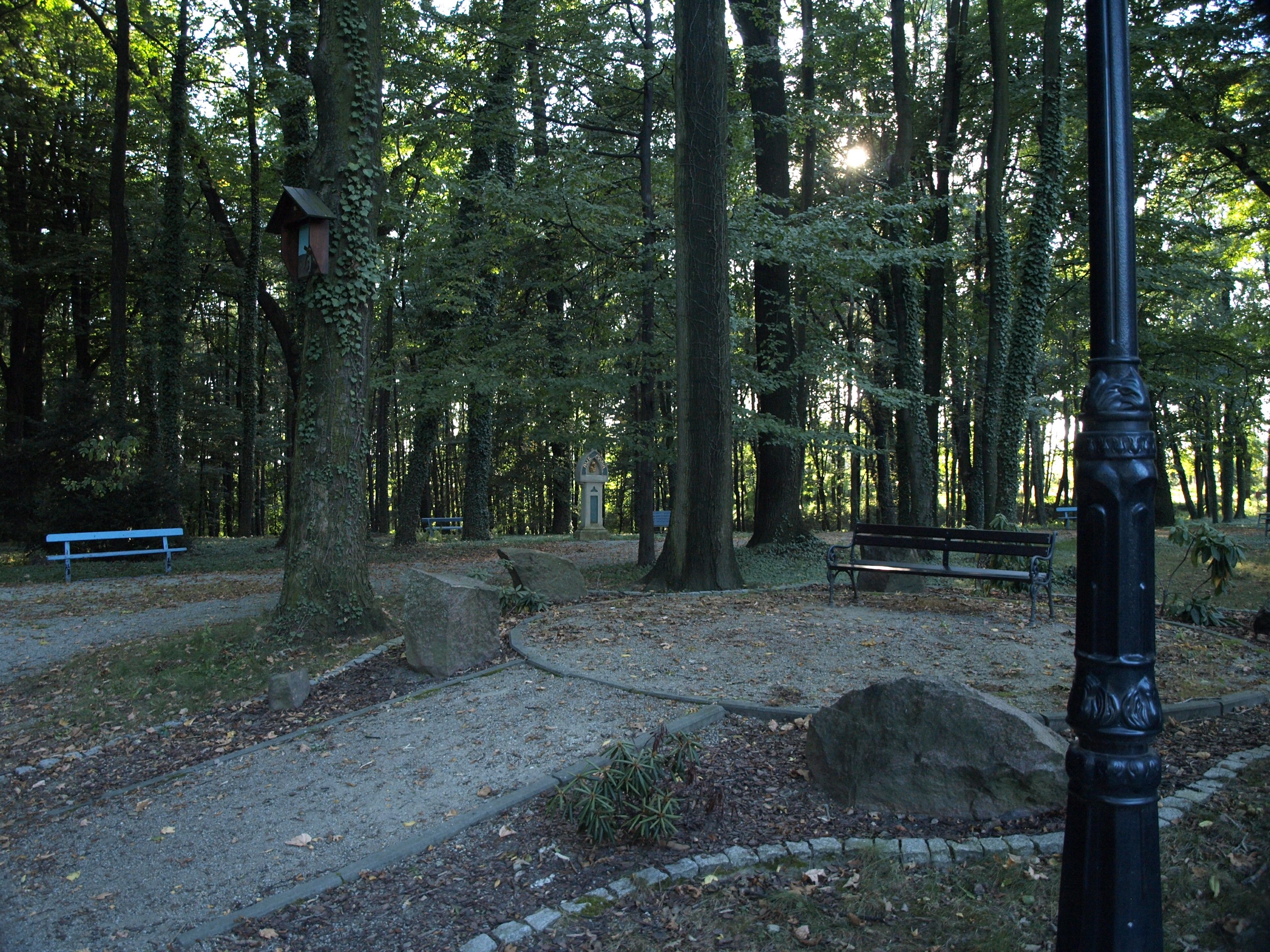 Park krajobrazowy Wodzisław Śląski Kokoszyce, Wodzisław Śląski